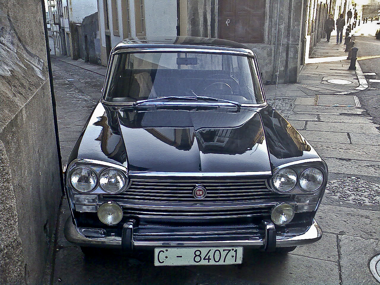 Seat 1500 en Santiago de Compostela no 2007.